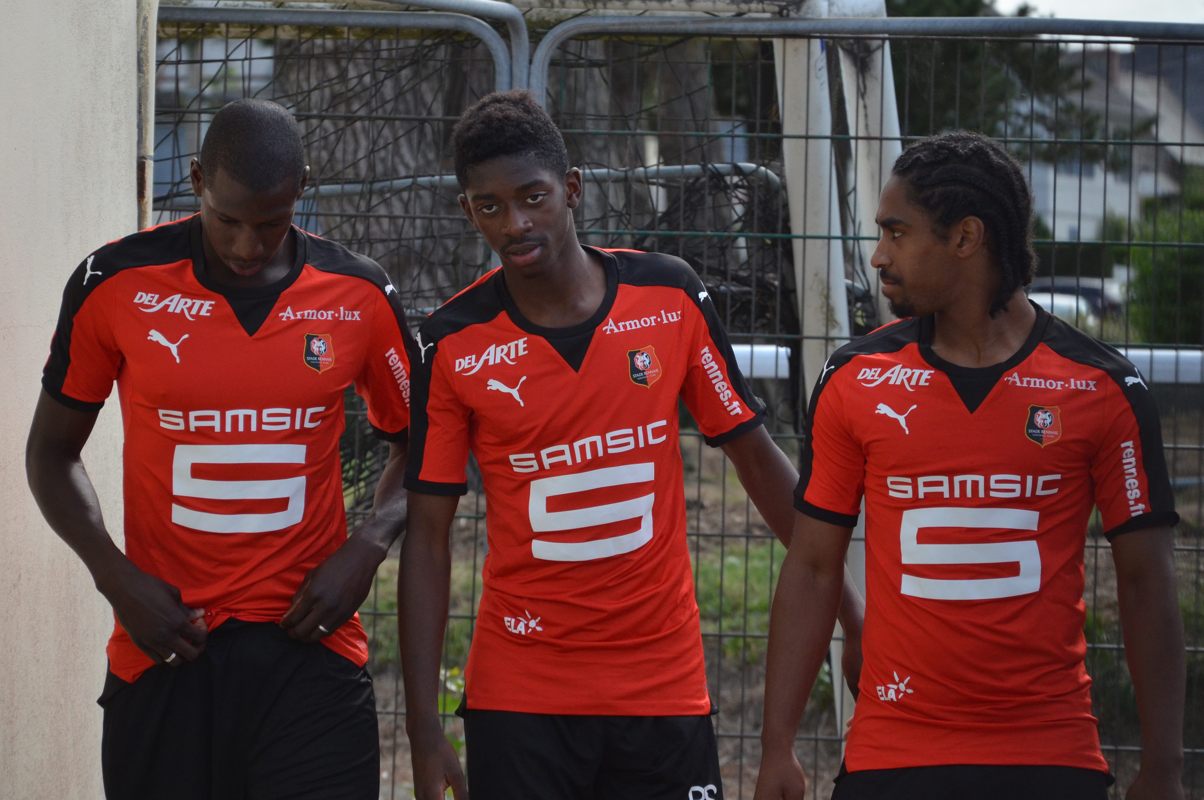 Photographie prise lors du match opposant le Stade rennais au Havre AC en amical au stade Paul-Audrin de Dinard le 8 juillet 2015. Ici, Abdoulaye Doucouré, Ousmane Dembélé et Wesley Saïd.